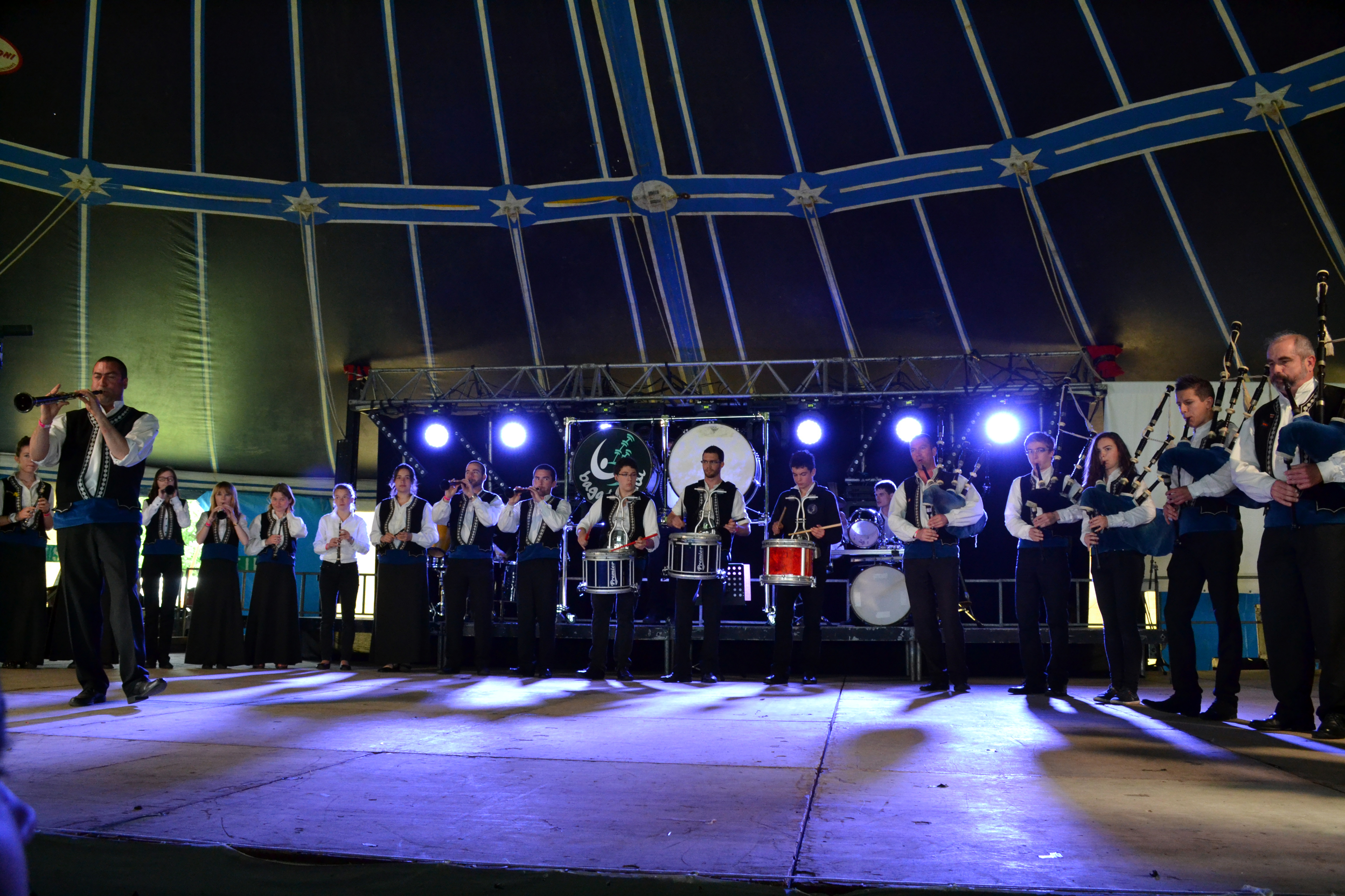 Le bagad Landi au Gouel Bro Leon à Plouvorn le 16 juin 2013.